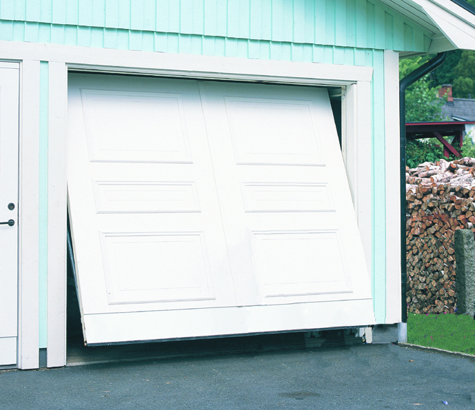 Vipport tillverkad av Diedenporten